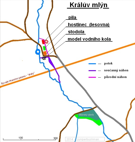 mapa Králova mlýna a rybníku u Králova mlýna